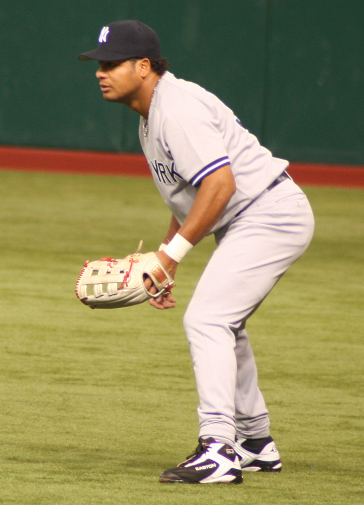 Photograph taken by Googie Man 15:50, 26 September 2006 . . Googie man . . 721×1000 (237,538 bytes)